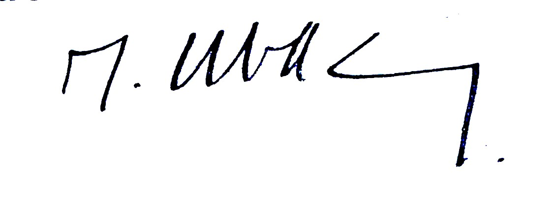 Signature du peintre Raoul Ubac, scan d'après lettre adressée à l'User. This signature is believed to be ineligible for copyright and therefore in the public domain because it falls below the required level of originality for copyright protection both in the United States and in the source country (if different). In this case, the source country (e.g. the country of nationality of the signatory) is believed to be France. Cette image ou le texte qui y est représenté est seulement composé de formes géométriques simples et de texte. Elle n’atteint pas le seuil d'originalité nécessaire pour la protection du droit d’auteur, et est donc du domaine public. See autographs of Magritte and Picasso